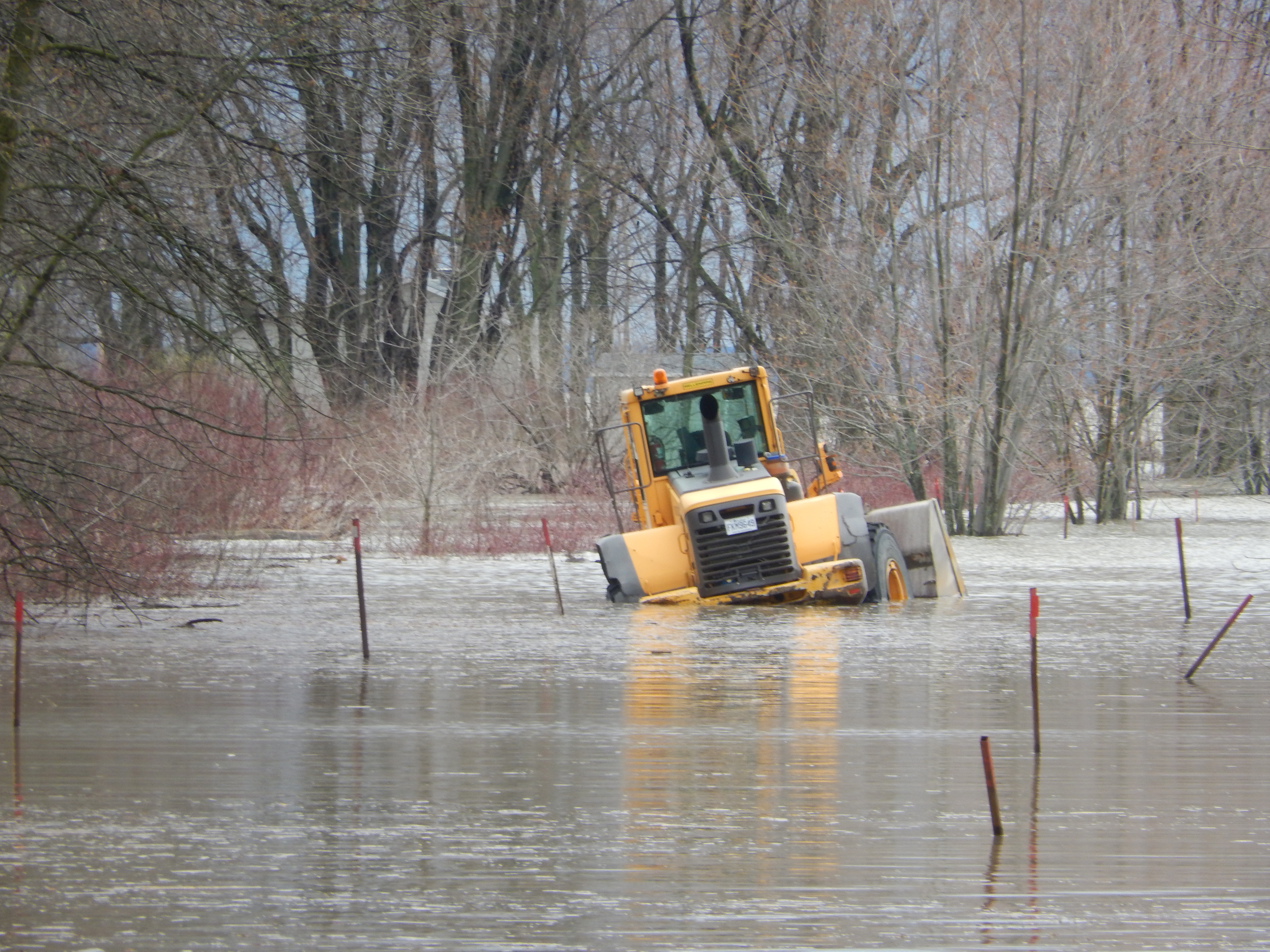 Chargeur coincé dans l'eau près du chemin Louis-Gatineau à Yamachiche.